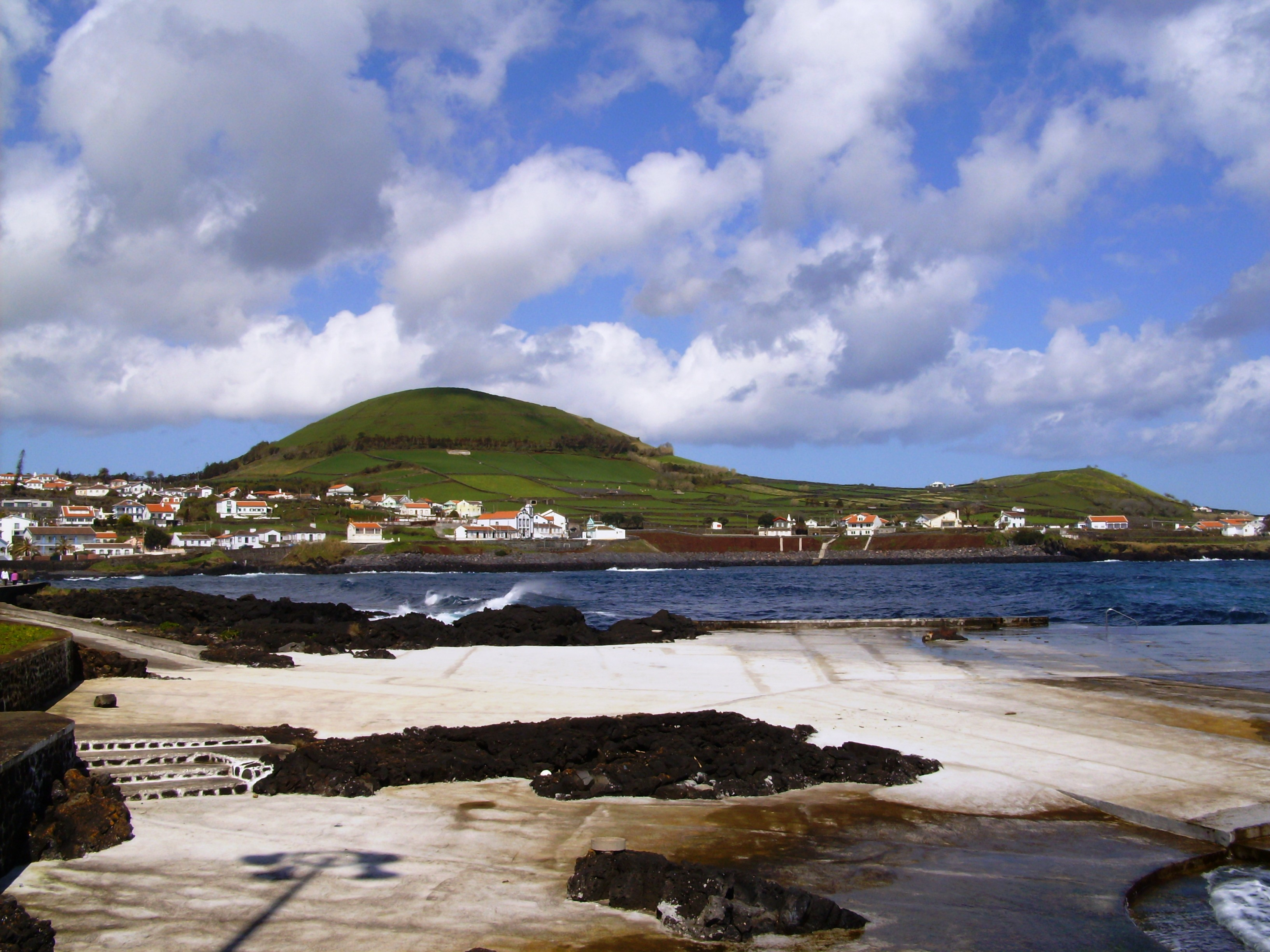 Porto Martins, Praia da Vitória, Ilha Terceira, Açores: vista panorâmica.